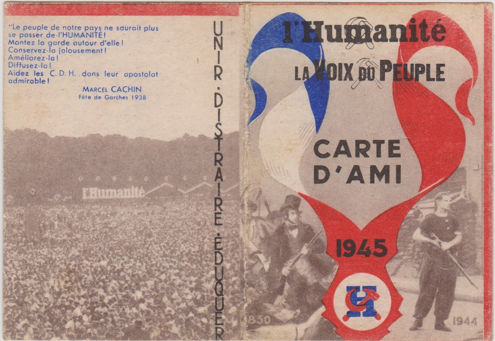 1er plat de la carte d'ami de l'Humanité et de la Voix du Peuple (journal paraissant à Lyon). D'autres cartes existent,associant le quotidien national à un journal communiste de "province", tel Rouge Midi, à Marseille. Éditées au début de l'année 1945.